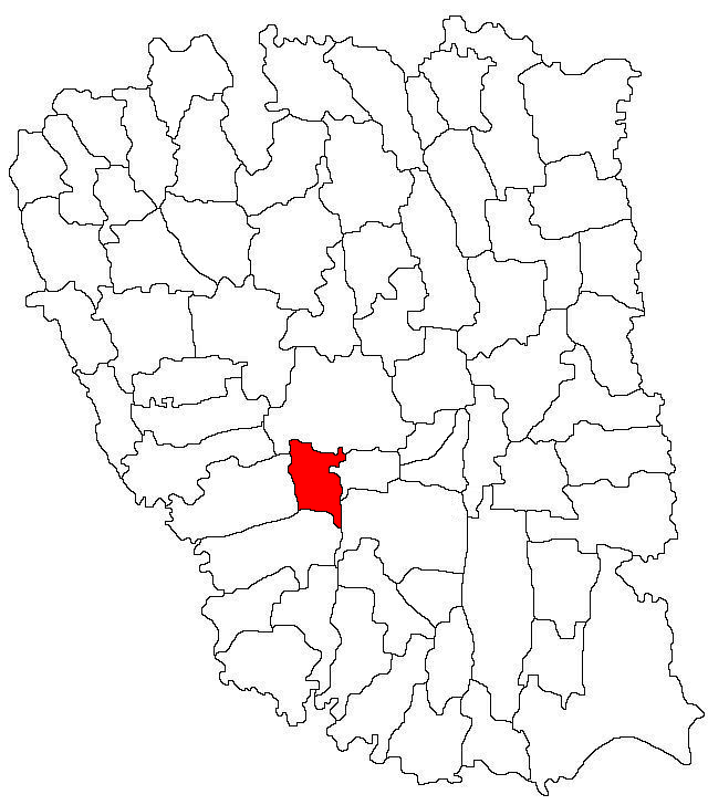 Categorie:Hărţi ale judeţului Galaţi